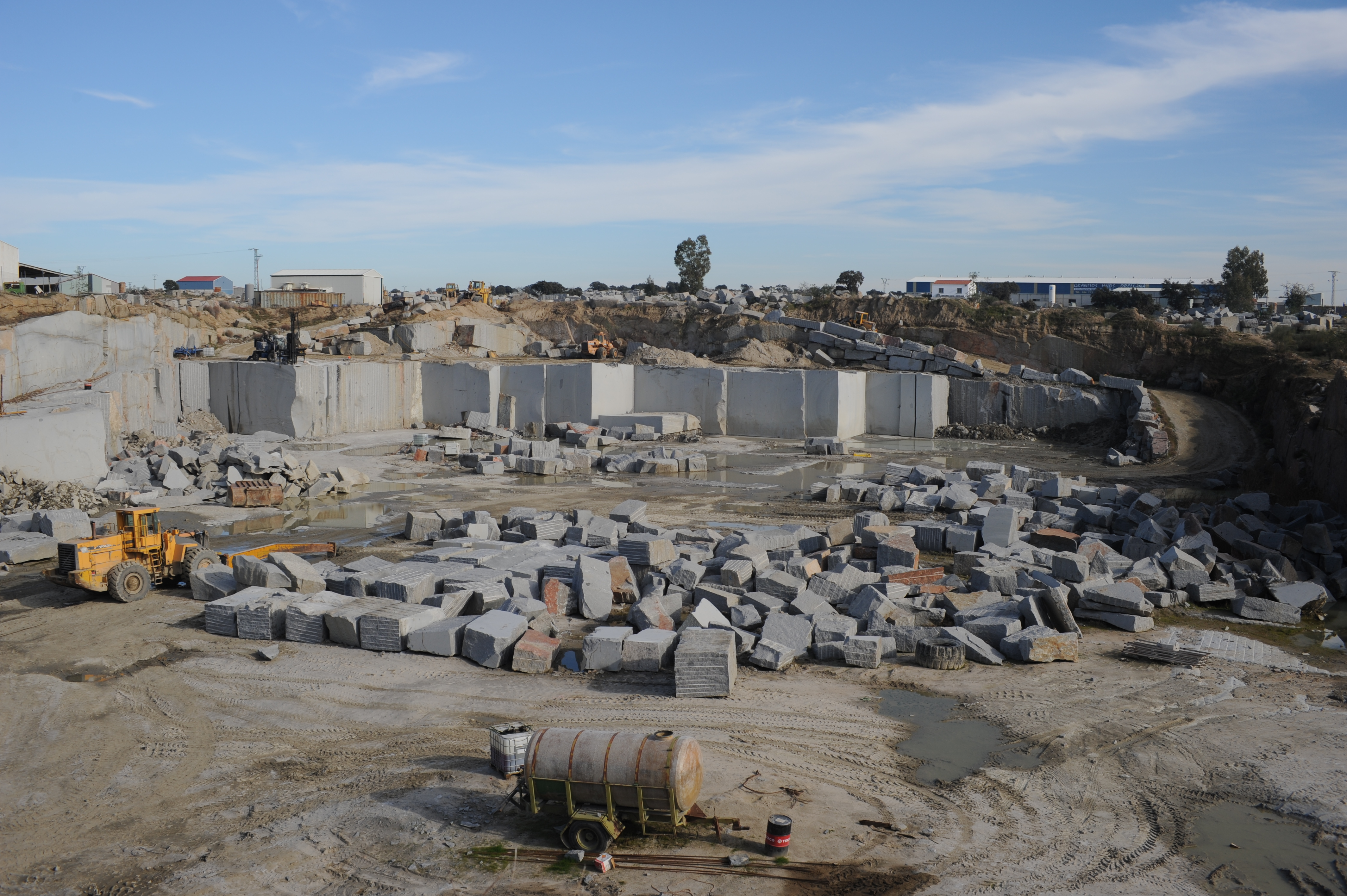 fotografía de la cantera de granito de Quintana de la Serena